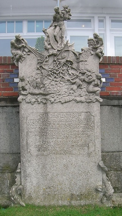 Denkmal zur Aufnahme des Postverkehrs zwischen Bremerhaven und New York mit dem Raddampfer Washington (Schiff, 1847)